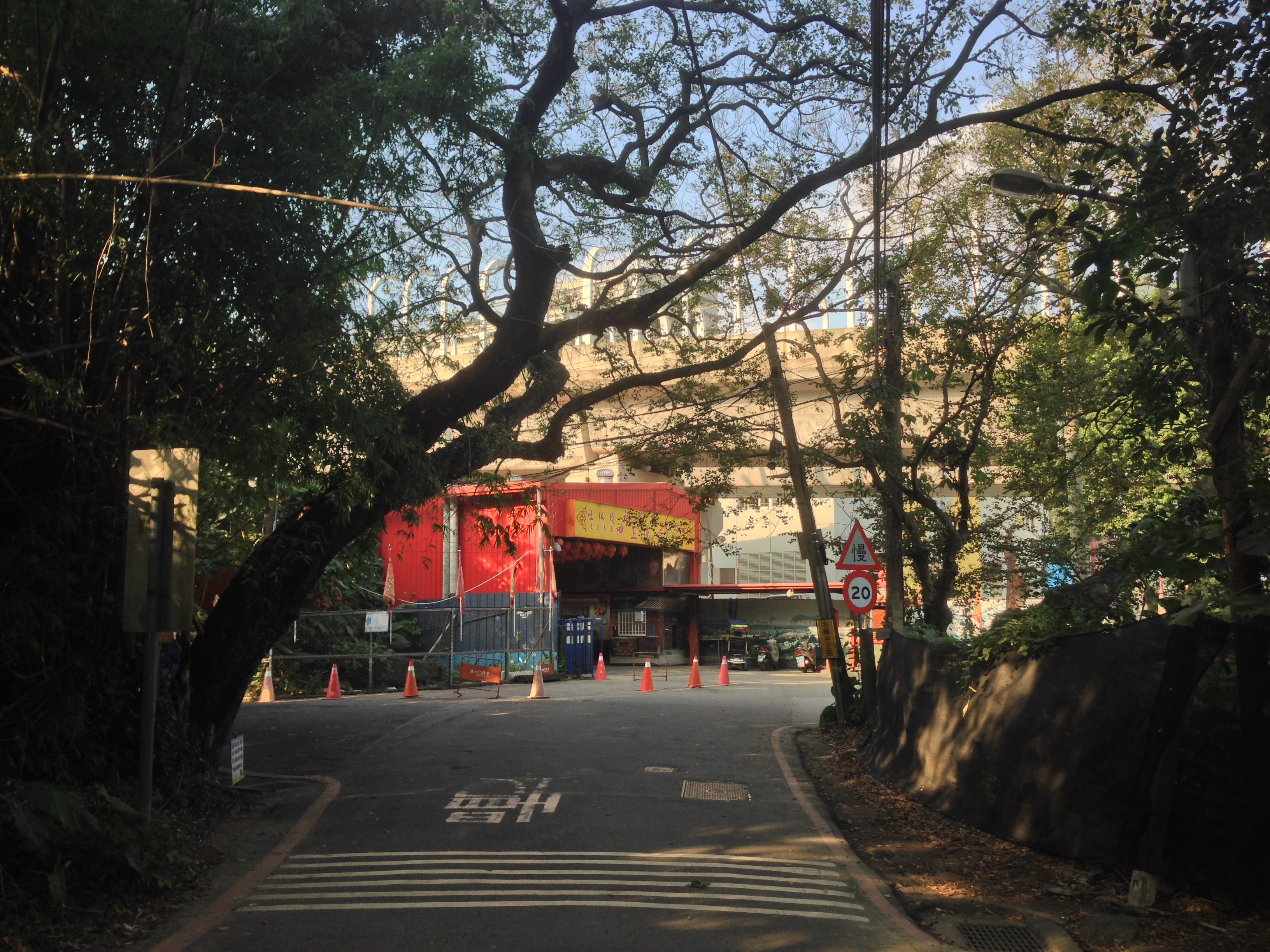 十四張站的斯馨祠臨時屋